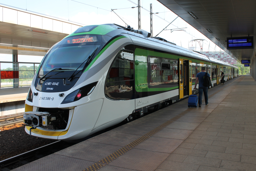 Elektryczny zespół trakcyjny Newag Impuls 45WE-004 stoi na przystanku kolejowym Warszawa Stadion.